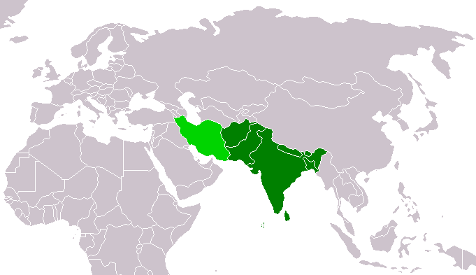 Der Mittlere Osten: Bangladesch, Bhutan, Indien, Malediven, Nepal, Pakistan, Afghanistan, Sri Lanka und zum Teil auch der Iran